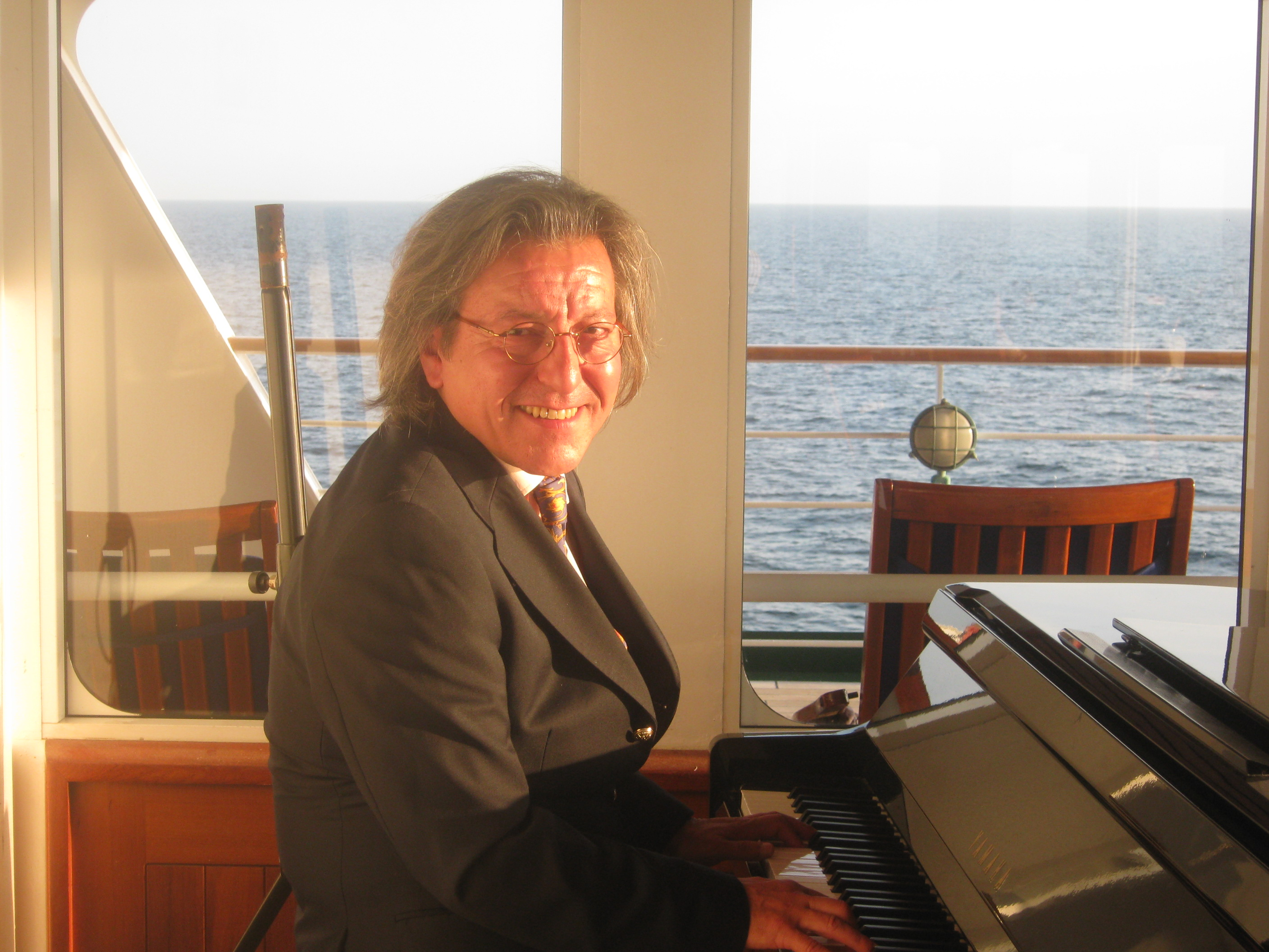 Barpianist Adriano auf MS Deutschland